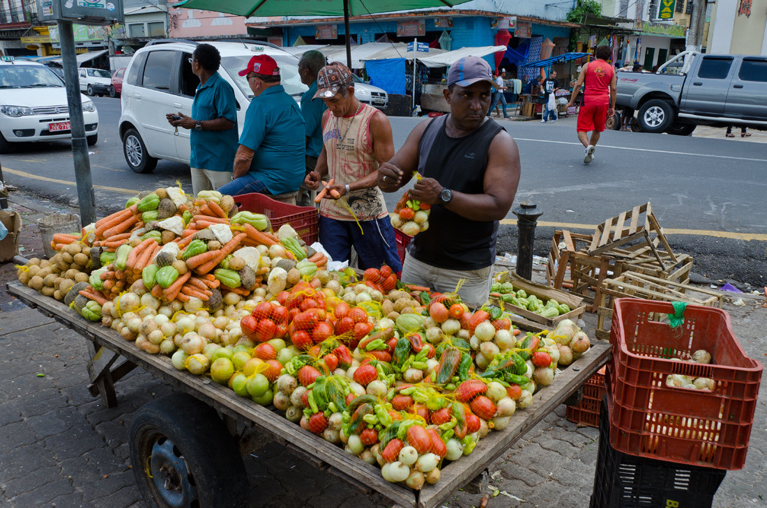 Mercado Ver-o-Peso, se pueden encontrar también vegetales de todo tipo y frutas variadas.